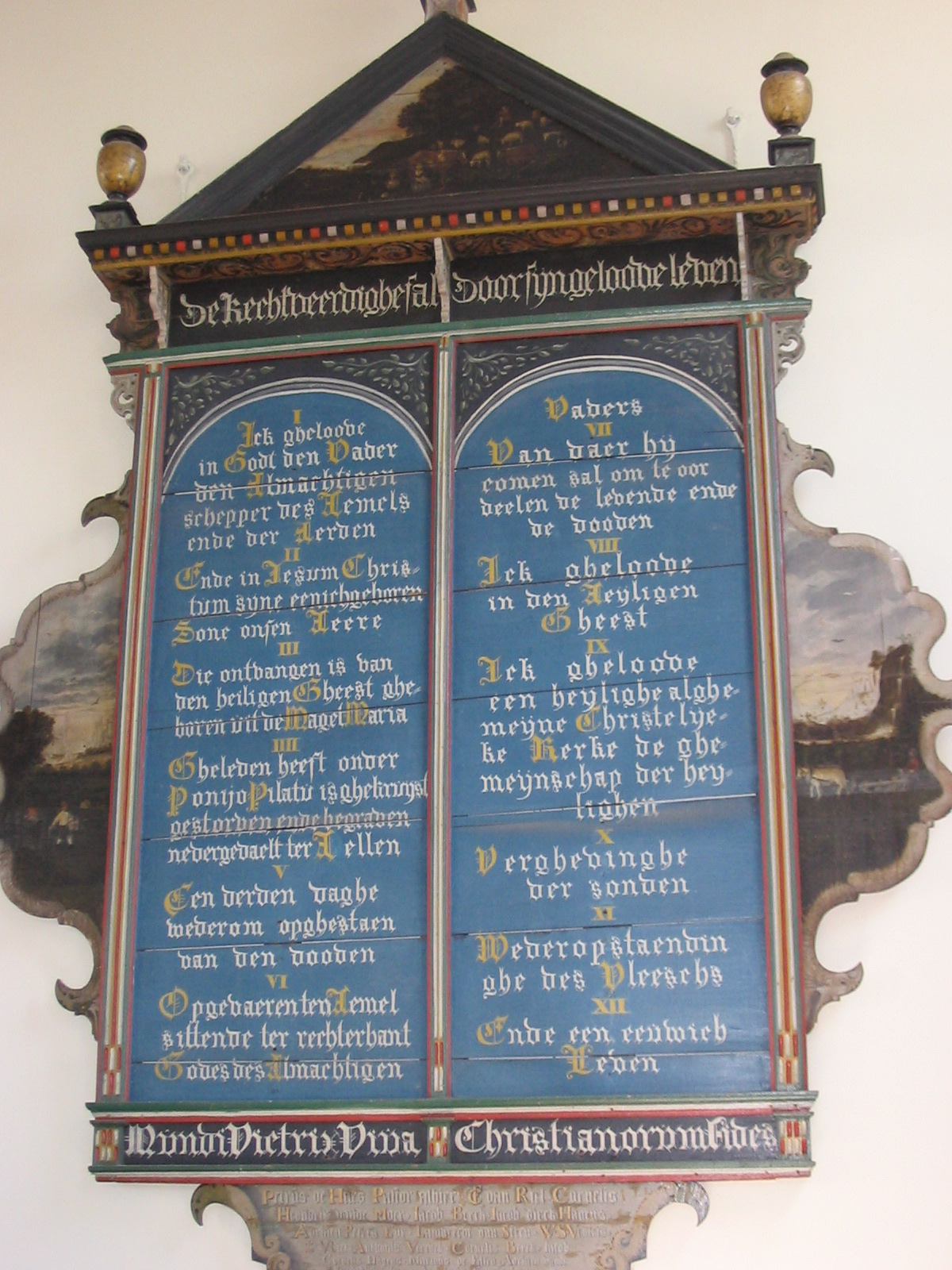 Geloofsbelijdenisbord Trouwkerkje Leur